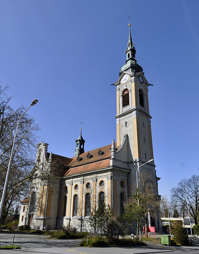 Pfarrkirche Emmishofen